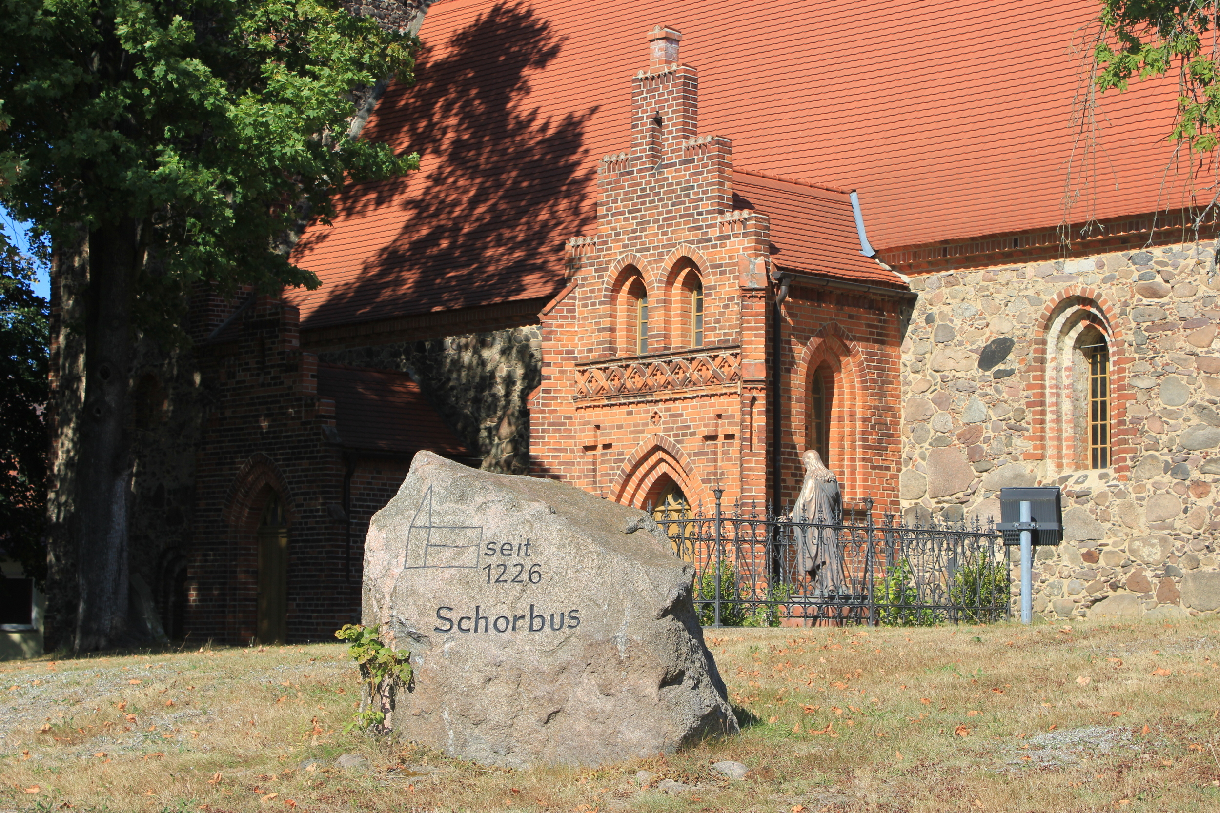 Hornjoserbsce: Ewangelska cyrkej w Skjarbošcu pola Drjowka.